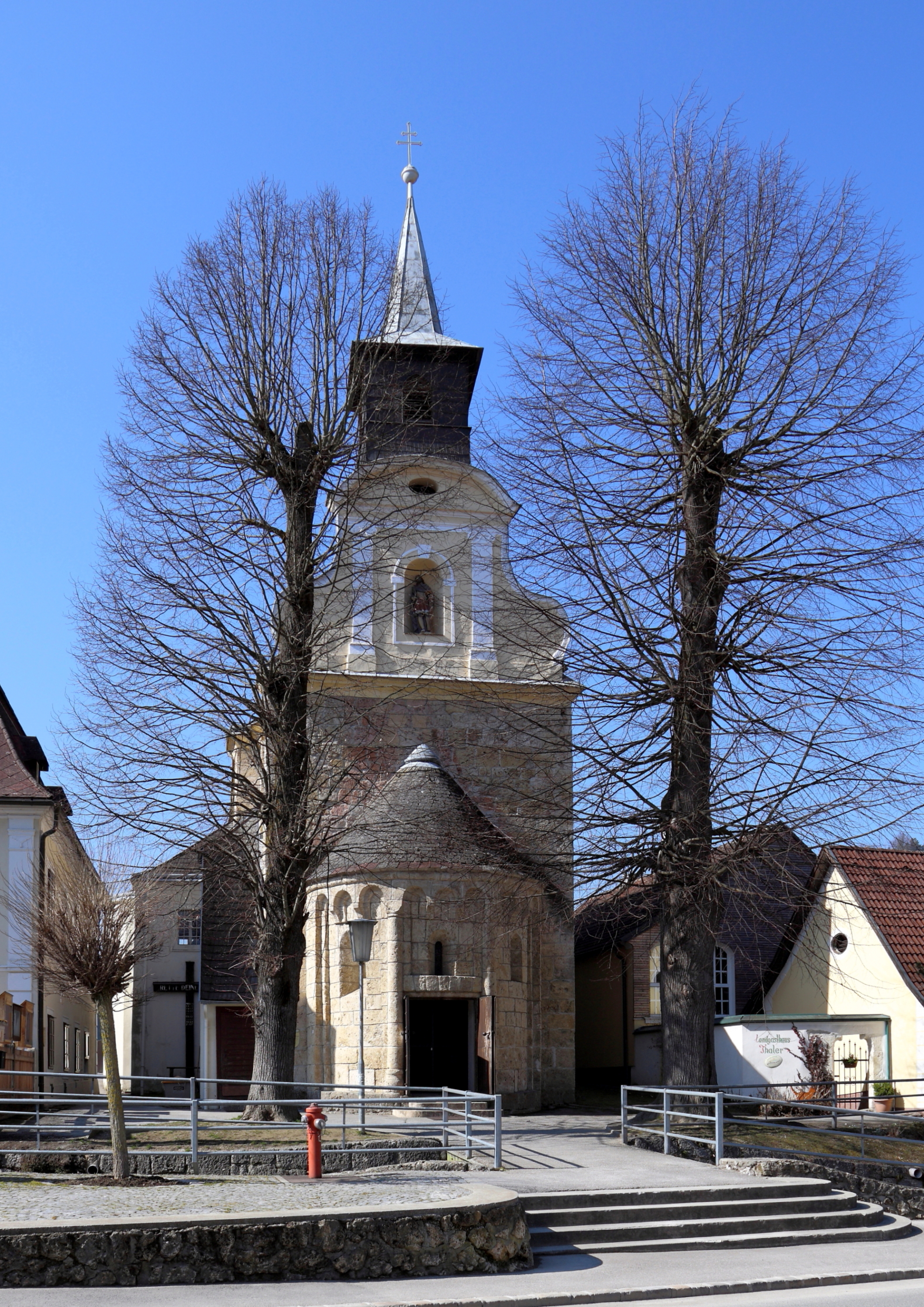 Ostansicht der Pfarrkirche Unbefleckte Empfängnis Mariae in Thernberg, ein Ortsteil der niederösterreichischen Markgemeinde Scheiblingkirchen-Thernberg. Eine romanische Kirche aus der Mitte des 12. Jahrhunderts. 1789 erfolgte ein Innenumbau und dabei wurde das Eingangstor nach Osten verlegt. Die Anbauten am Langhaus wurden im 18. Jahrhundert errichtet.